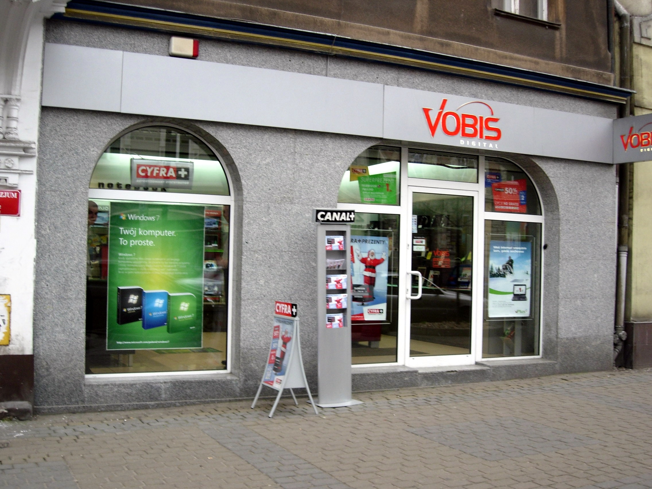 Sklep sieci Vobis w Bydgoszczy, przy ul. Gdańskiej 69 (filia nr 683).